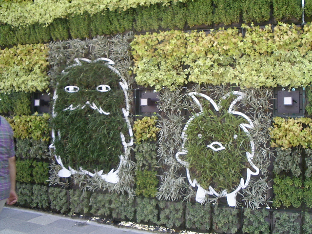 Morizo and Kikkoro at Expo 2005